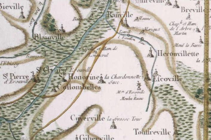 Plan Cassini, Colombelles